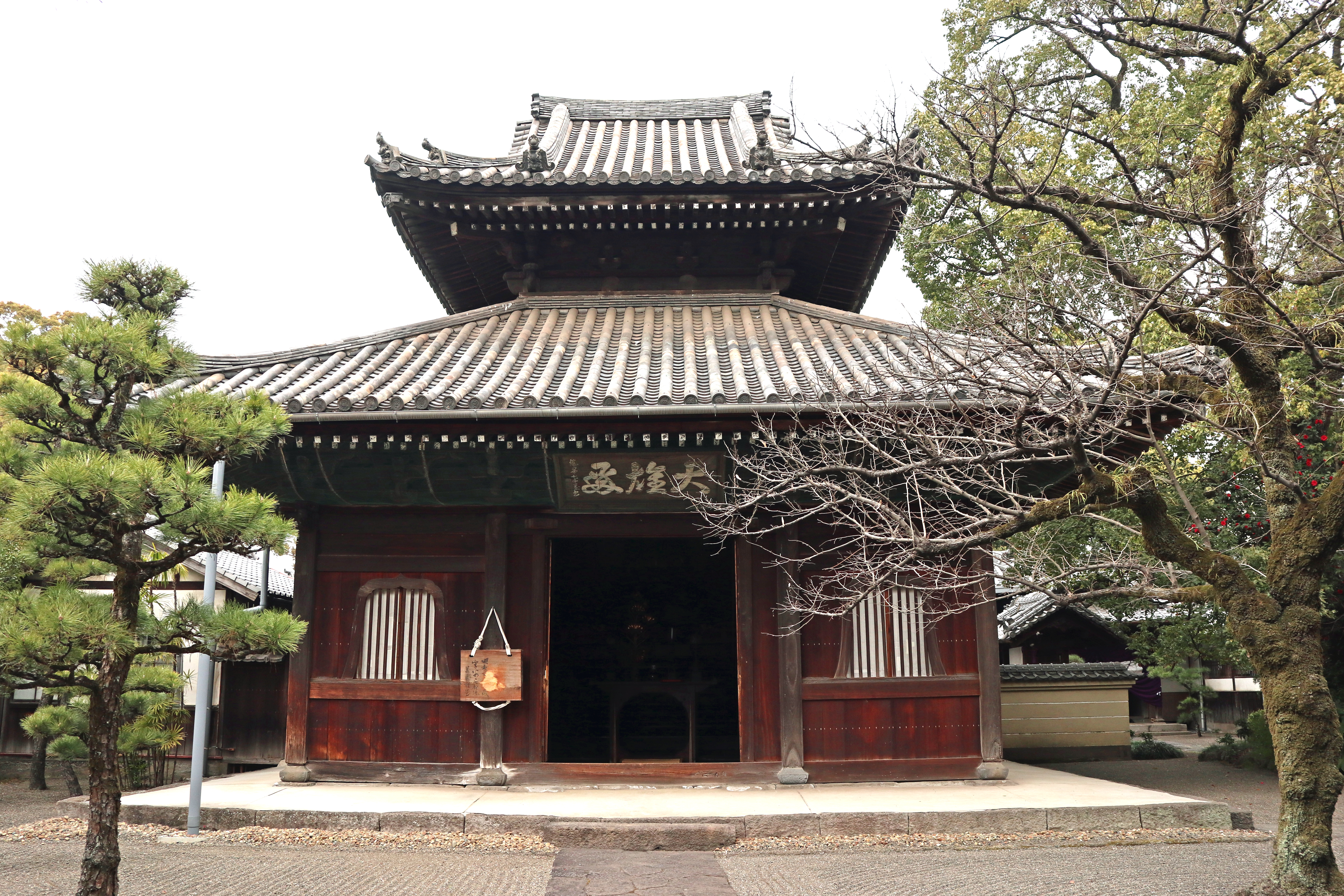 大分市にある臨済宗の寺院万寿寺の仏殿